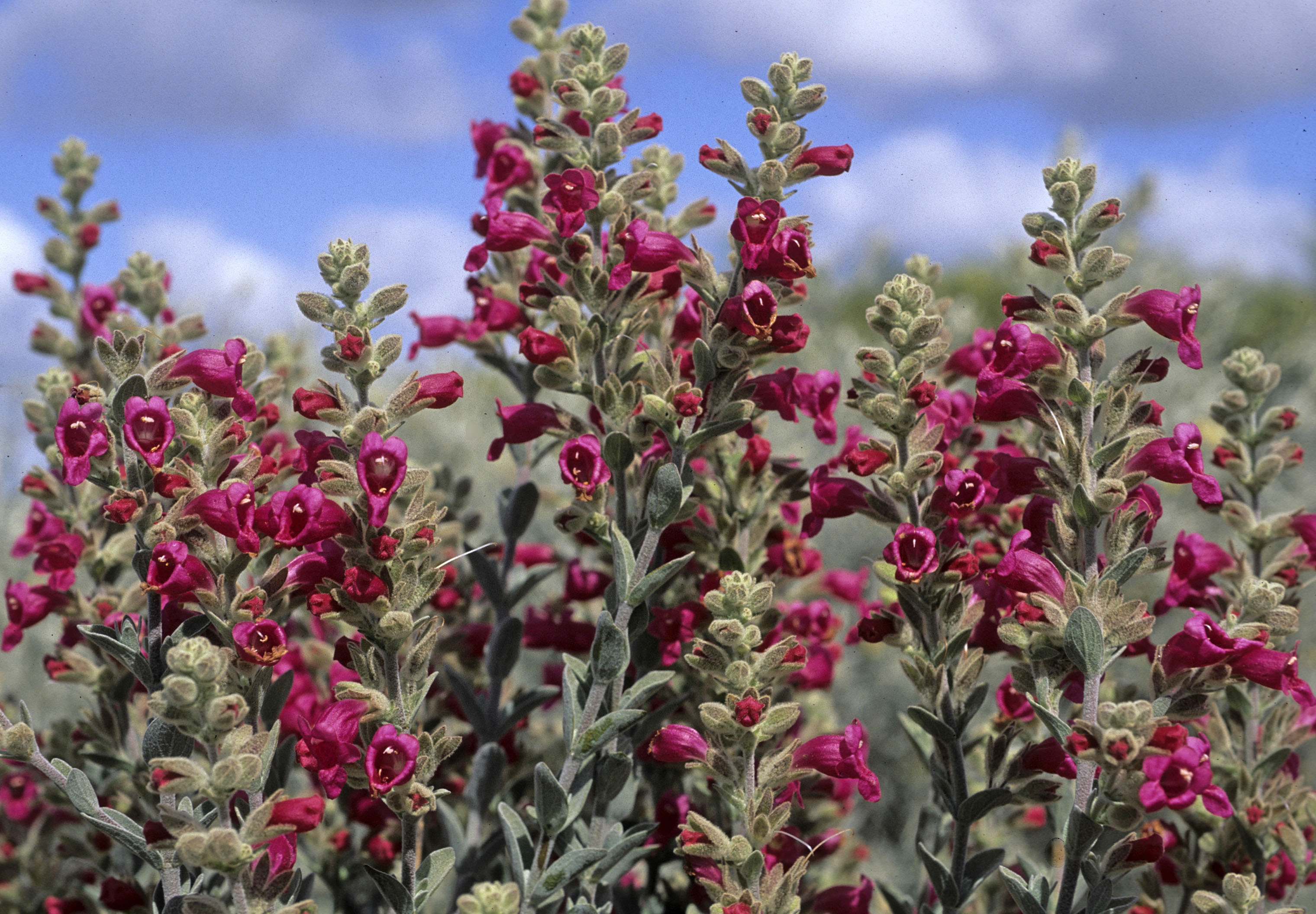 Dasymalla terminalis (ex Pityrodia terminalis) en Geraldton-Mt Magnet Road (nr123) entre Mullewa y Pindar, al Sur de la Woodenooka Nature Reserve, Western Australia. Vista de conjunto.